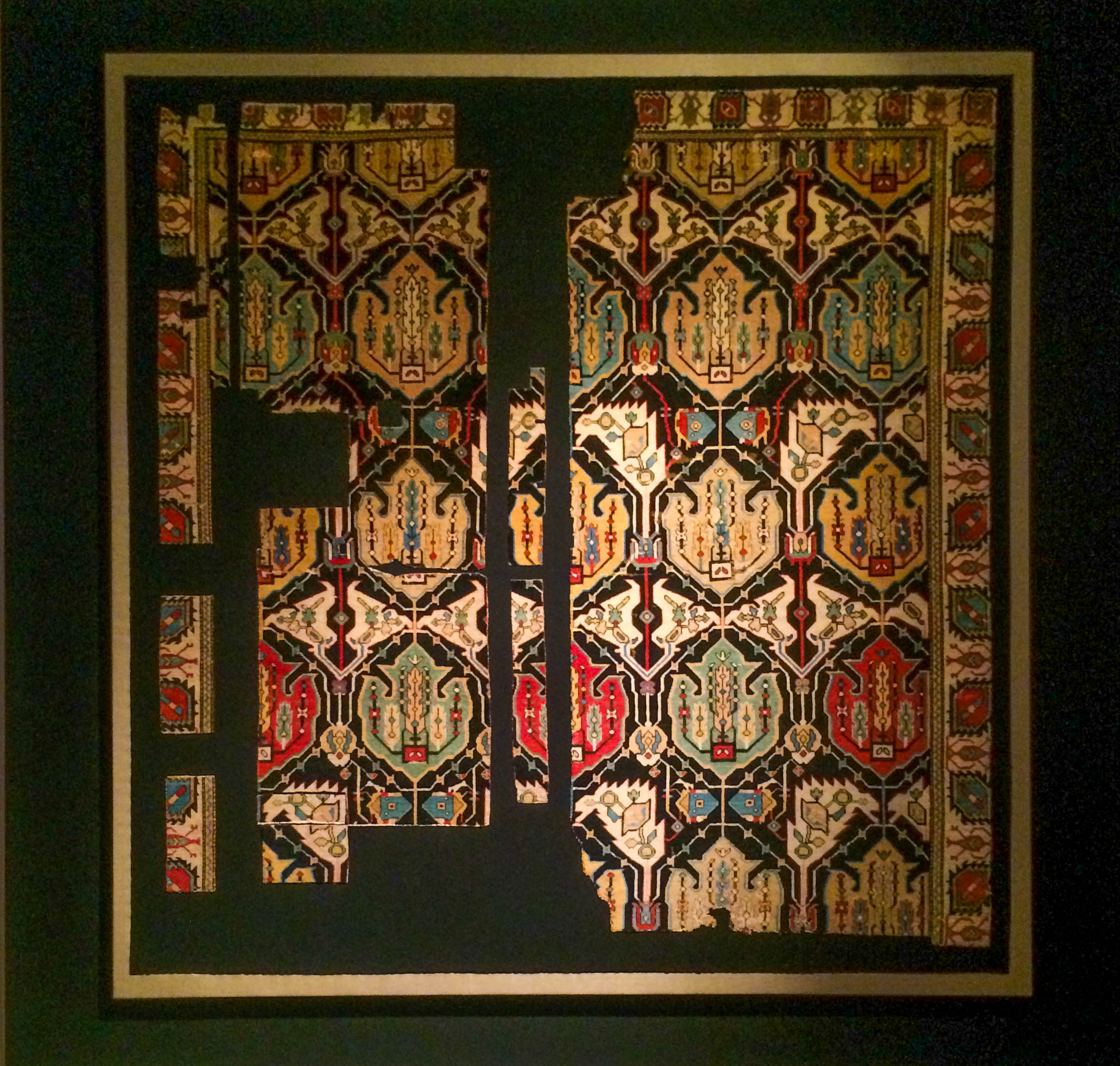 Qalxan formalı palmettalar xalçası, Şirvan, XVII əsr, ipək ərişli xovlu yun xalça, İslam İncəsənəti Muzeyi, Berlin, inc. nöm. KGM 1889, 157 & I. 9476, Azərbaycan Milli İncəsənət Muzeyində sərgilənir.